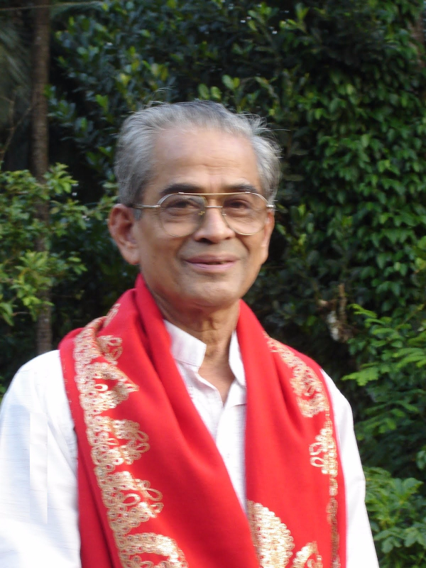 ಕನ್ನಡ: ಮೂಡಂಬೈಲು ಗೋಪಾಲಕೃಷ್ಣ ಶಾಸ್ತ್ರಿಗಳು